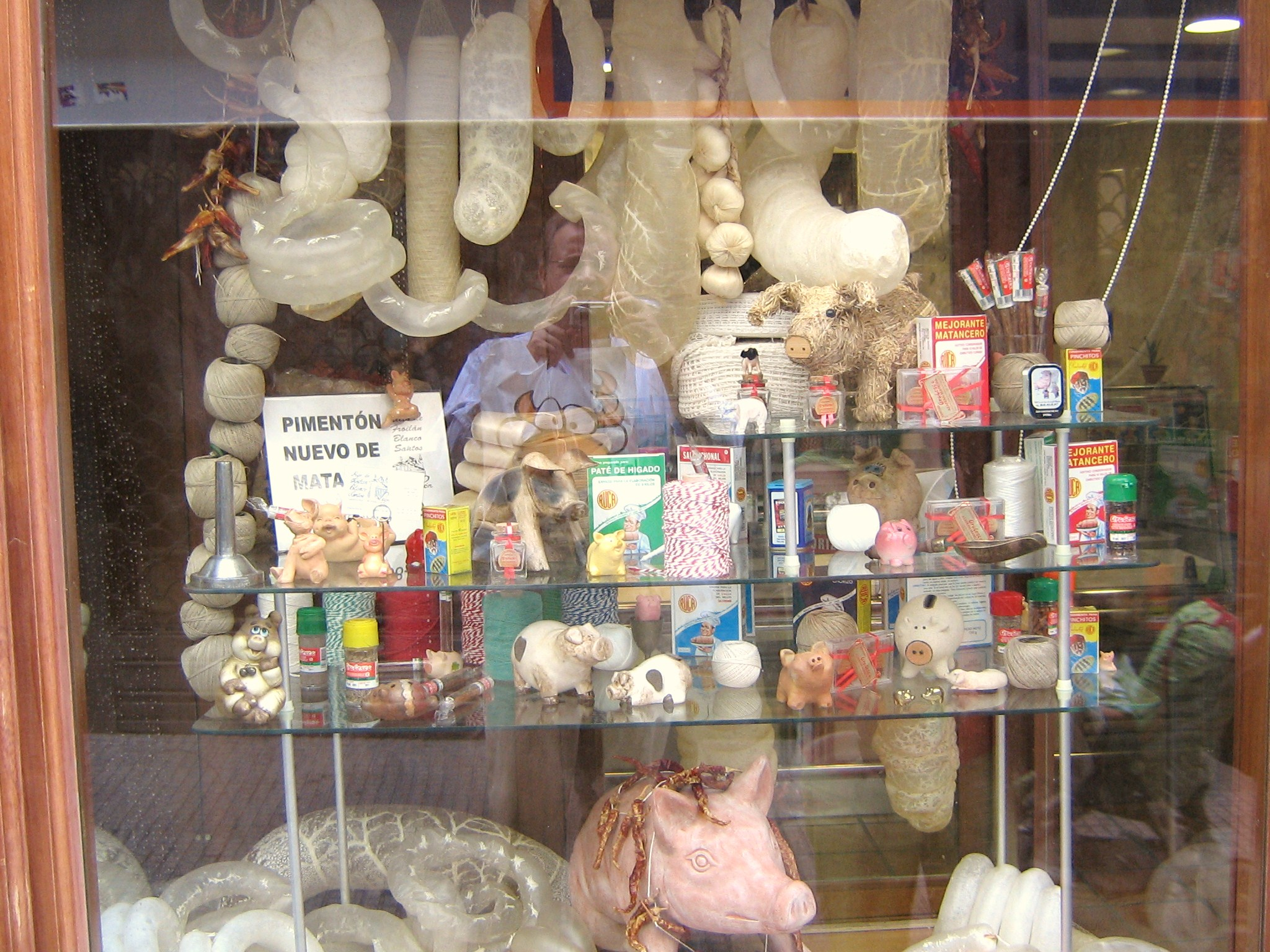 Escaparate de tienda en la ciudad de León (España) que exhibe las ditintas clases de tripas para embutir carne, que pone a la venta.